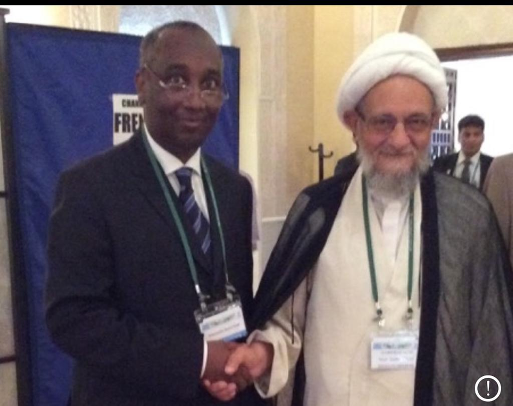 Réunion de l’Institut de normalisation et de métrologie pour les pays islamiques